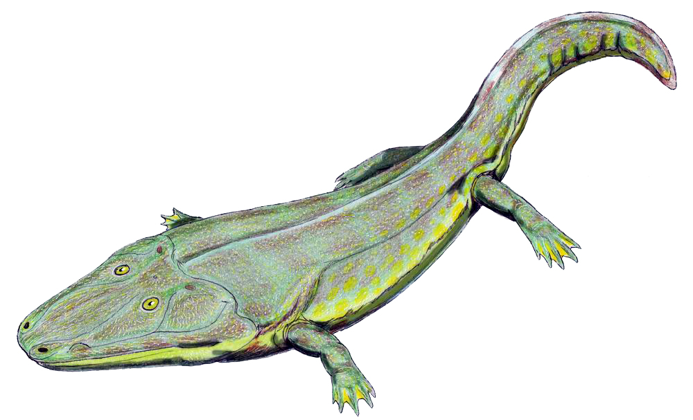 Cyclotosaurus reconstruction